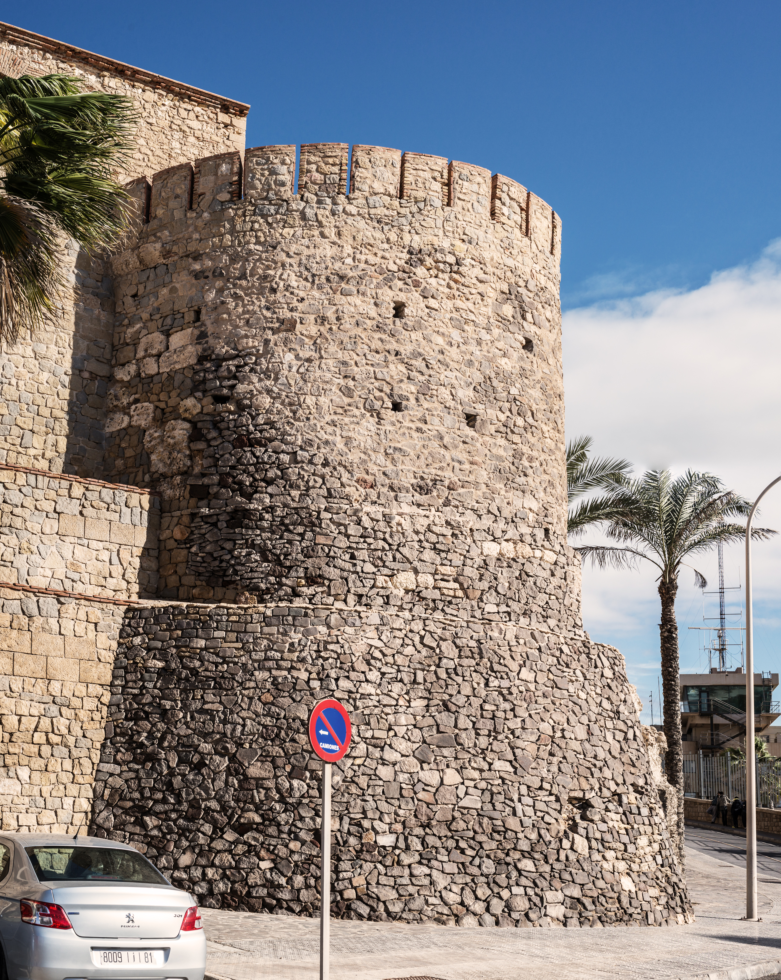 El Torreón de Florentina es un torreón situado en el ángulo sudeste del Primer Recinto Fortificado Melilla la Vieja, la ciudad española de Melilla, y forma parte del Conjunto Histórico Artístico de la Ciudad de Melilla, un Bien de Interés Cultural.